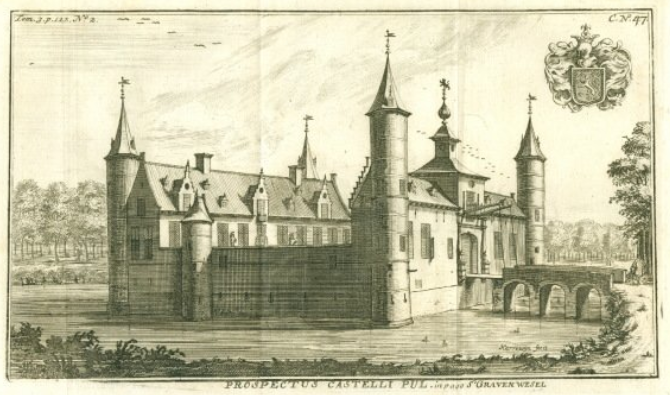 'Delices du Brabant et de ses campagnes': Prospectus Castelli Pull -n payo s'Gravenwesel. uitgever: Jean Neaulme, gravure: Harrewijn (originele kopergravure van 1757 gedrukt op papier) (